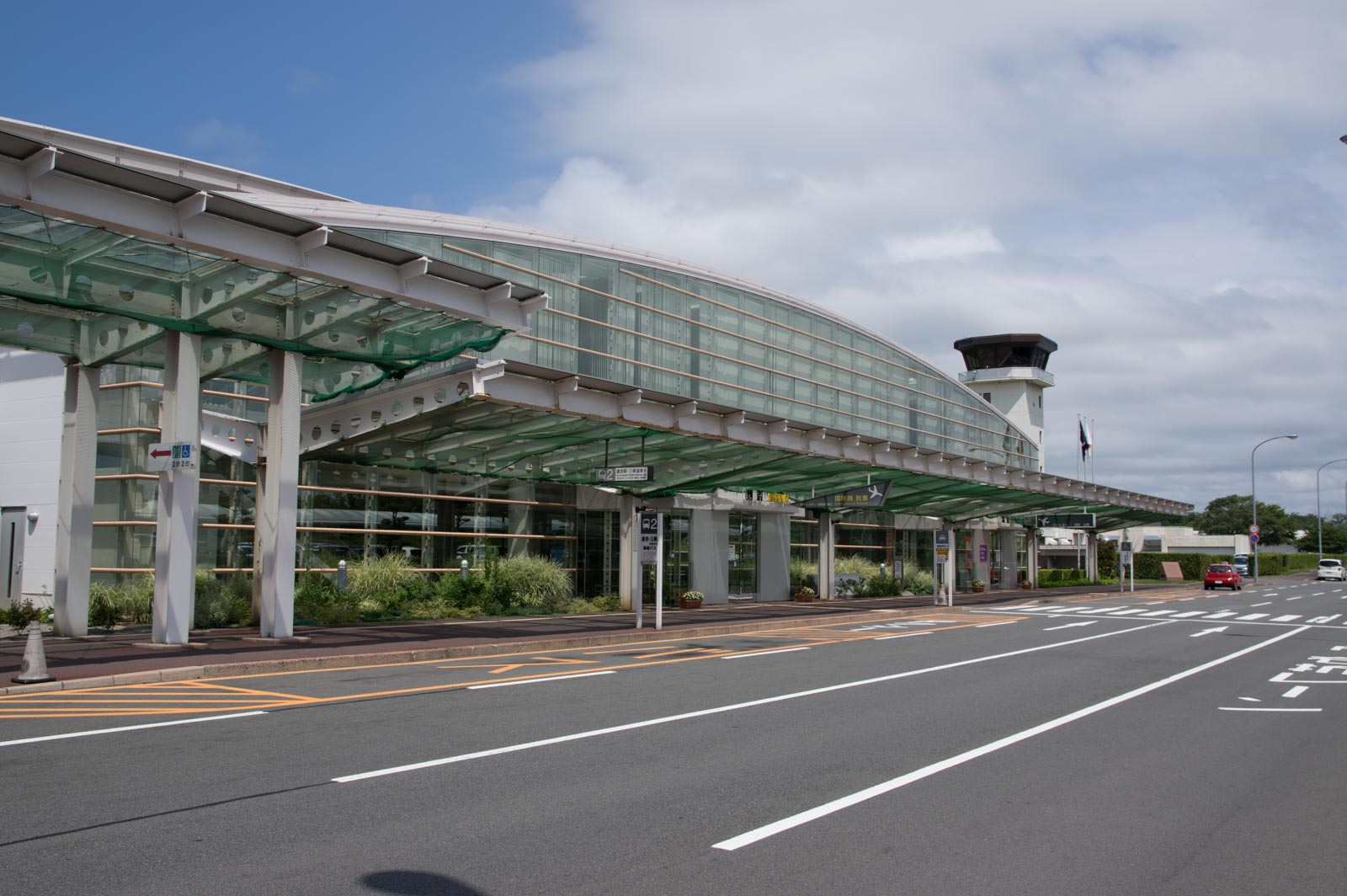 鳥取空港国際線ターミナル（国際会館）外観全景